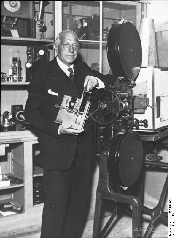 Oskar Messter geb. 21.11.1866 gest. 7.12.1943